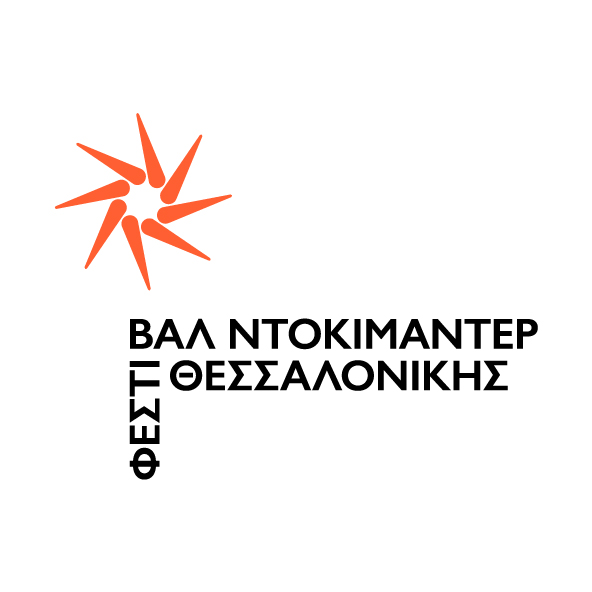 This is the new logo of the Thessaloniki Documentary Festival